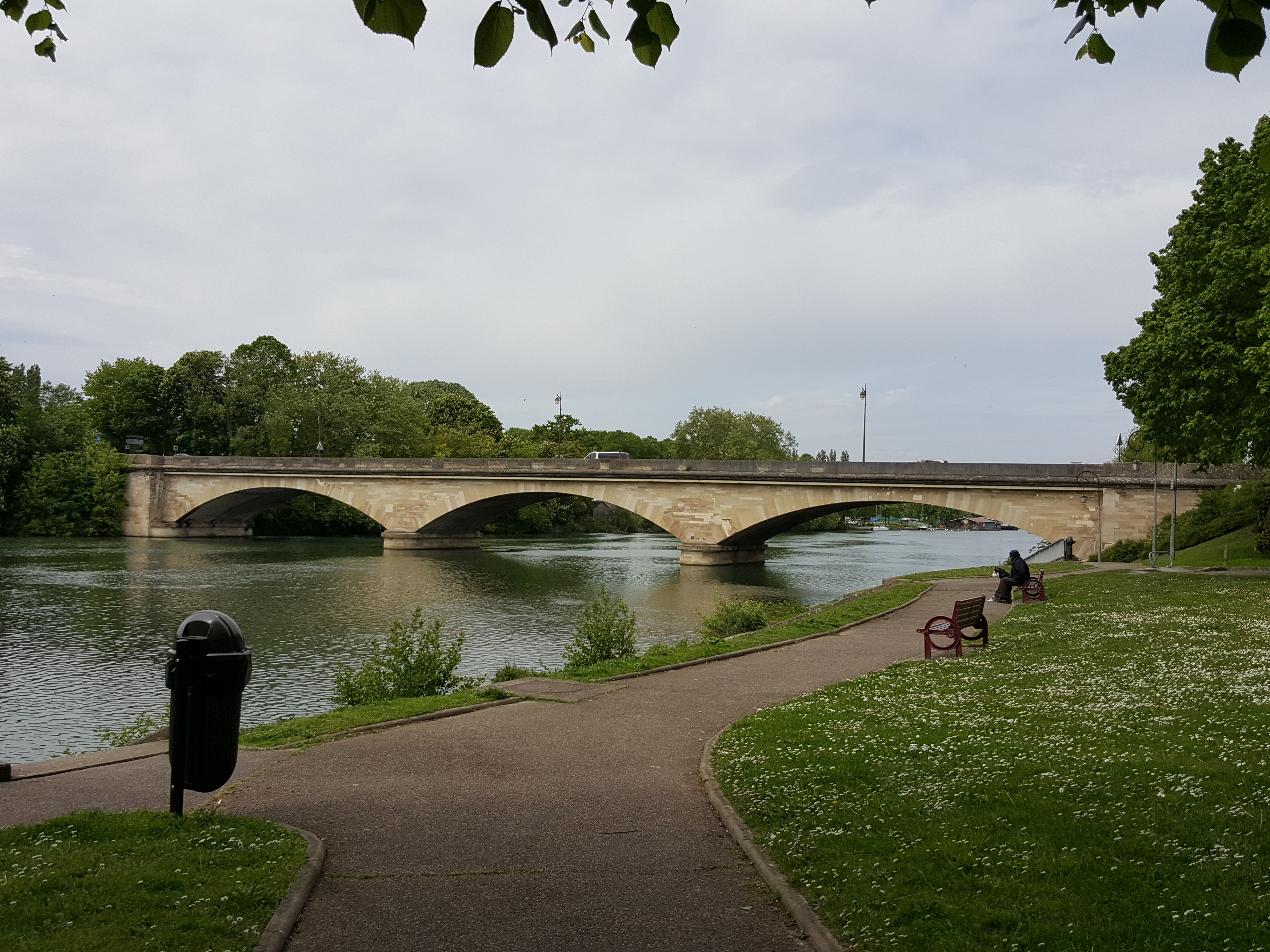 Pont neuf de Limay sur la Seine (Yvelines, France)